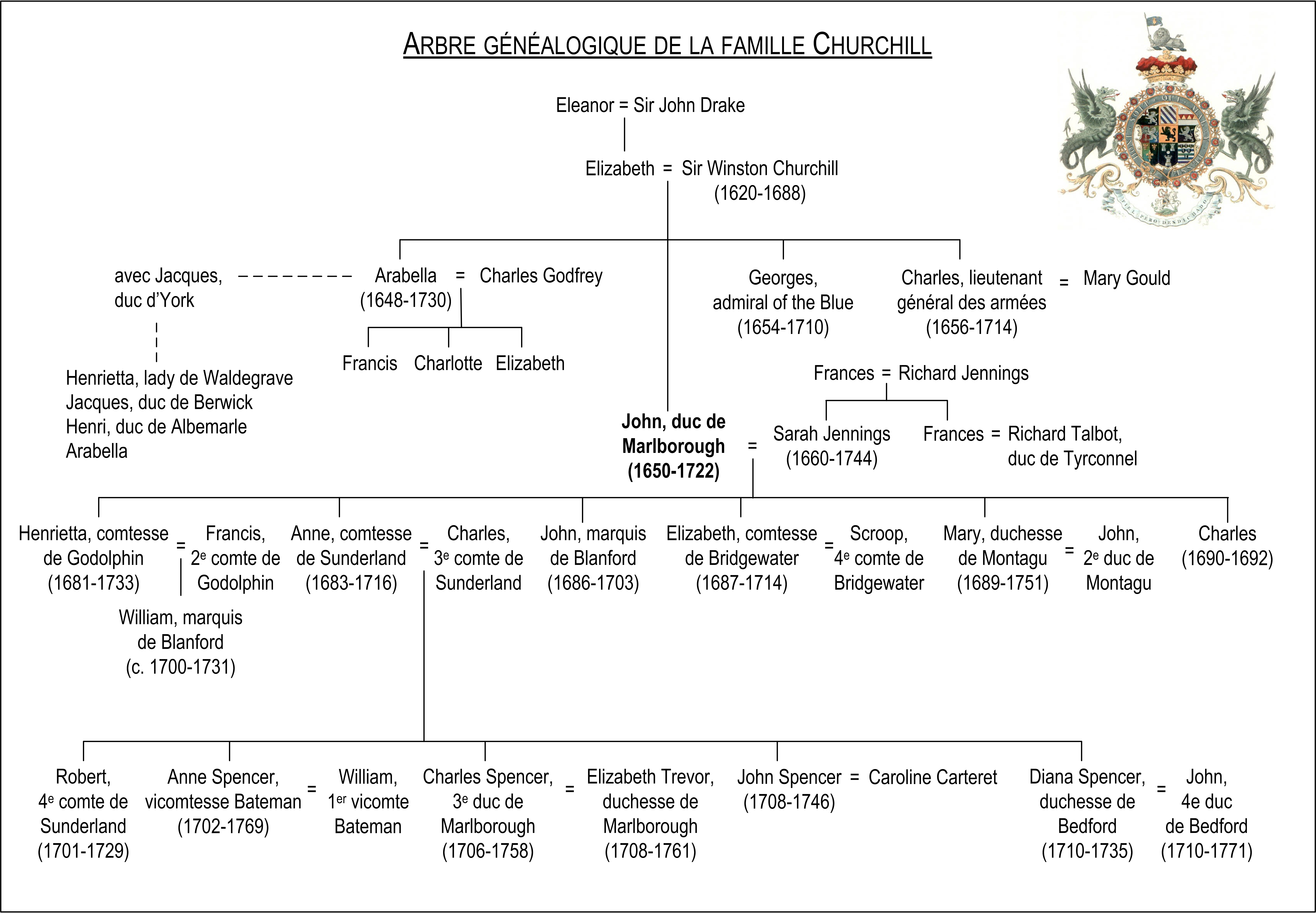 Arbre généalogique du 1er duc de Marlborough (John Churchill, 1650-1722). Travail fortement inspiré de File:The 1st Duke of Marlborough's genealogy.PNG